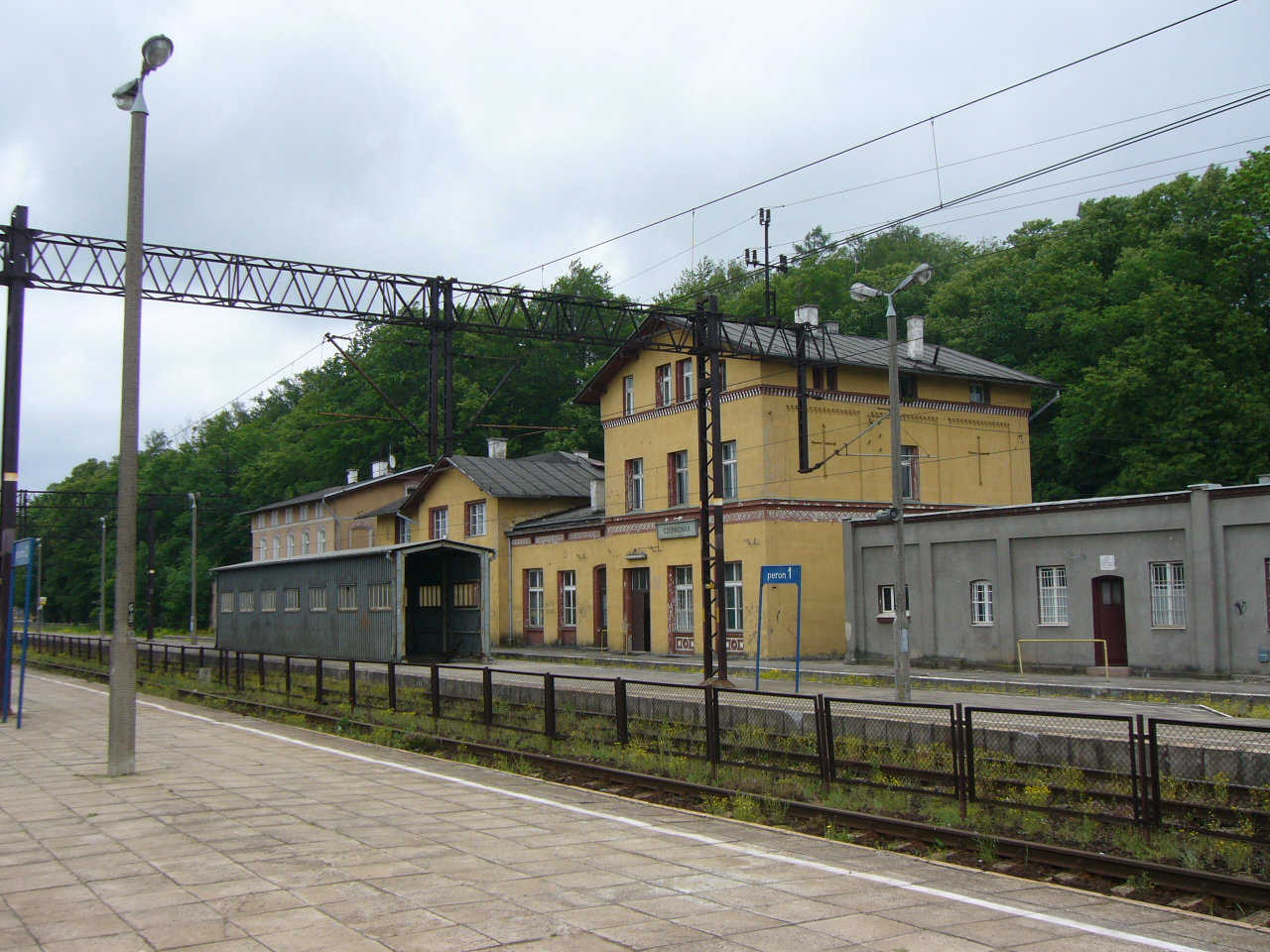 wieś Czerwonka, powiat olsztyński, Warmia, stacja kolejowa